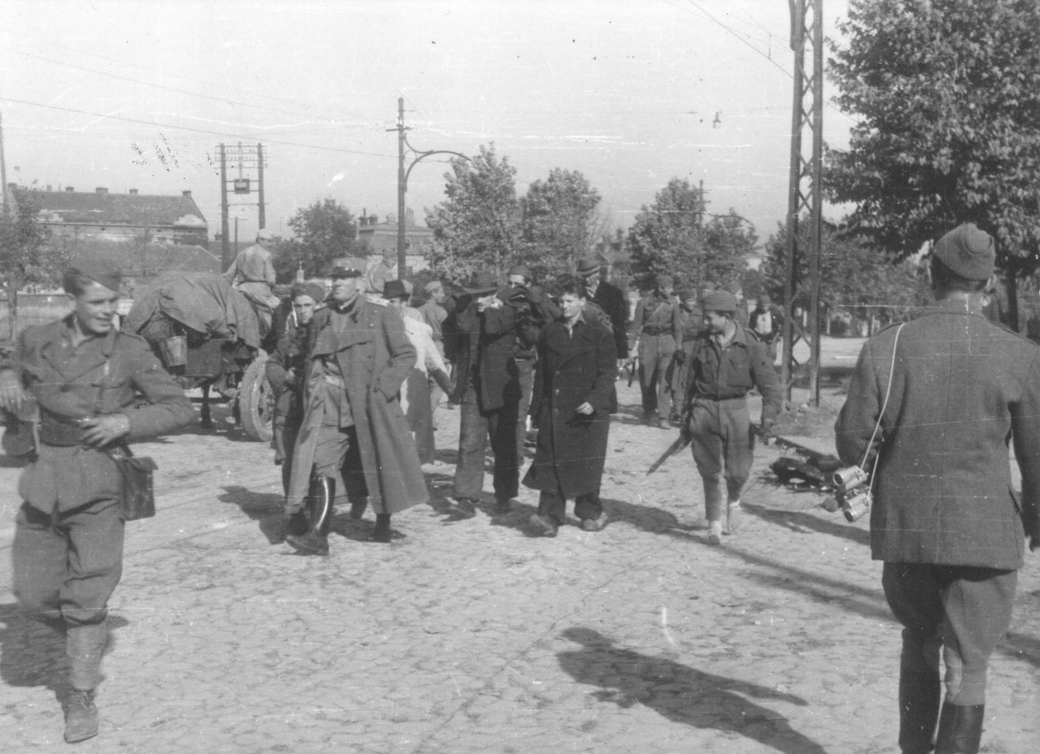 Srpskohrvatski / српскохрватски: Zarobljeni oficiri kvislinga Milana Nedića prilikom oslobođenja Beograda, oktobra 1944.